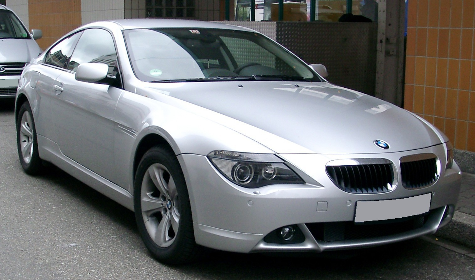 BMW E63